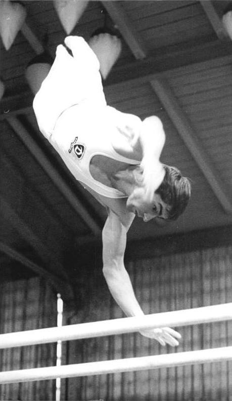 Roland Bruckner ADN-ZB Mittelstädt 1-10-79 Schwedt: 31. DDR-Meisterschaften im Turnen - Der bisher dreimalige DDR-Mehrkampfmeister Roland Bruckner (SC Dynamo Berlin) führt erwartungsgemäß. In seiner Barren-Pflicht-Übung erreichte er 9,35 Punkte.